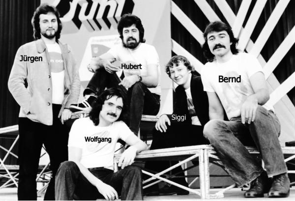 Von Oom bei einer FDJ-Werkstattwoche in Suhl